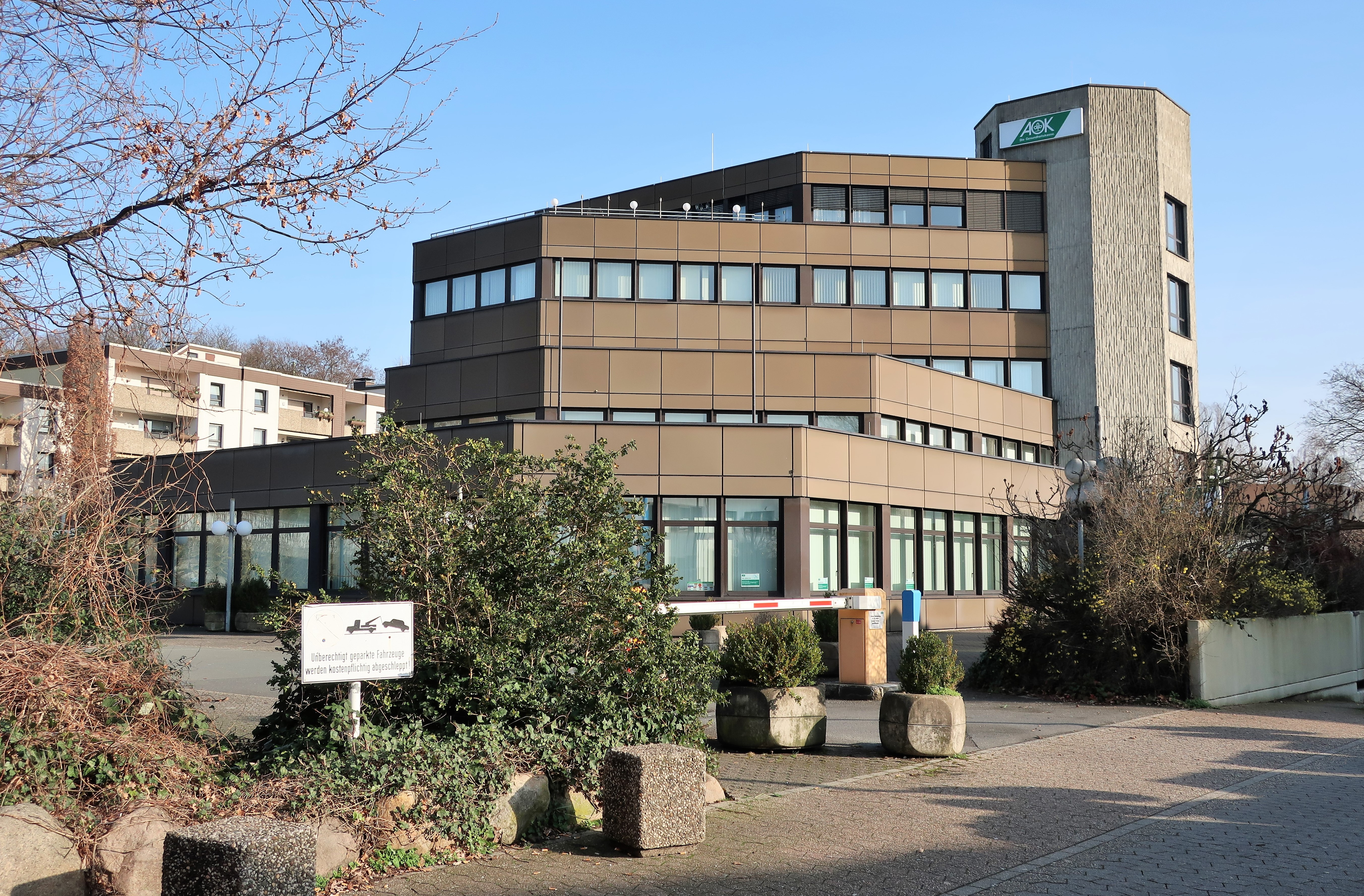 Gebäude der AOK NordWest in Hagen, Am Widey 2-4.